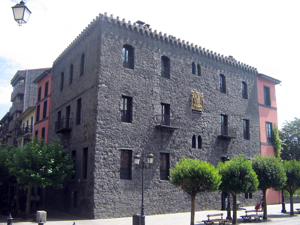 Torre Idiaquez, del municipio guipuzcoano de Azkoitia. Data del siglo XV.